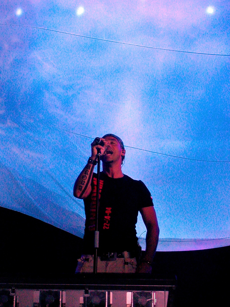 Eros Ramazzotti